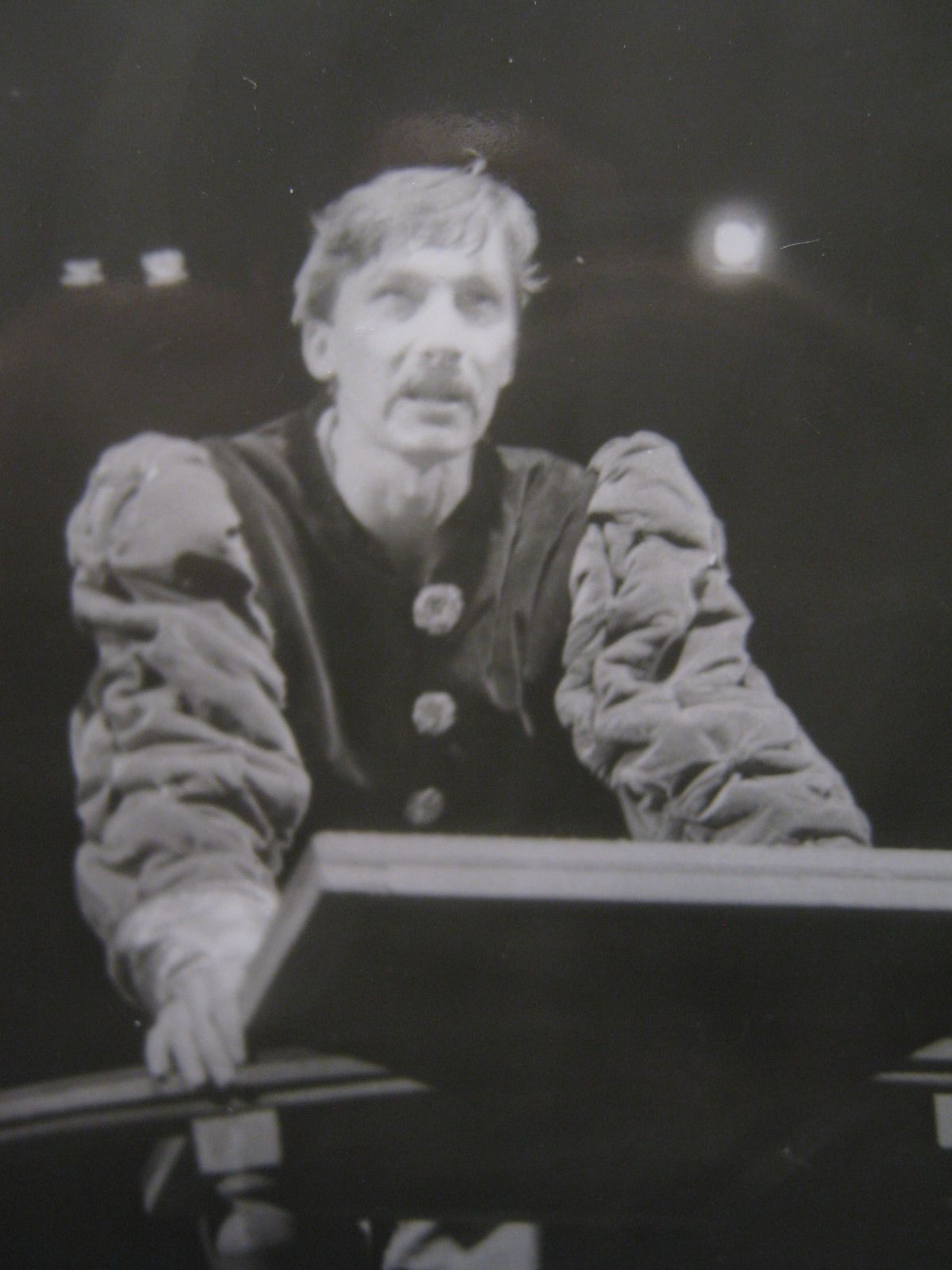 Сцена из спектакля «Женитьба Белугина» Л. Кудряшов в роли Андрея Белугина, режиссёр-постановщик Егоров Геннадий Семёнович